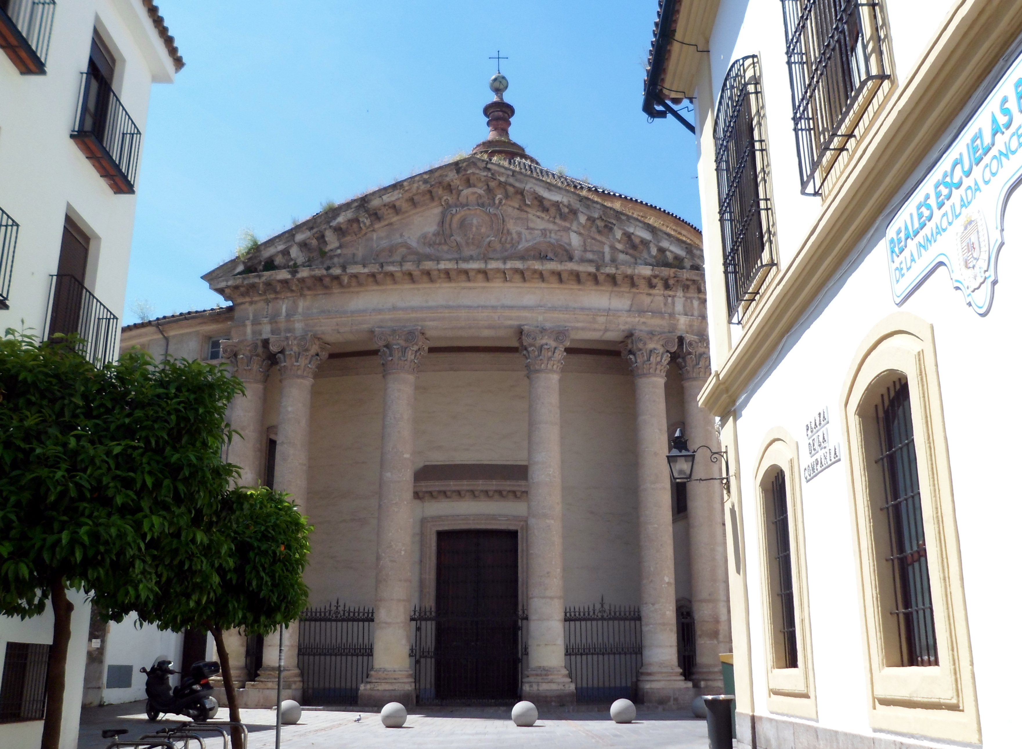 Iglesia del Colegio de Santa Victoria, Córdoba (España).